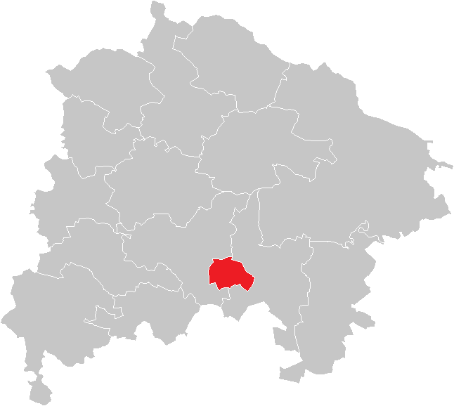 Bezirk Waidhofen an der Thaya